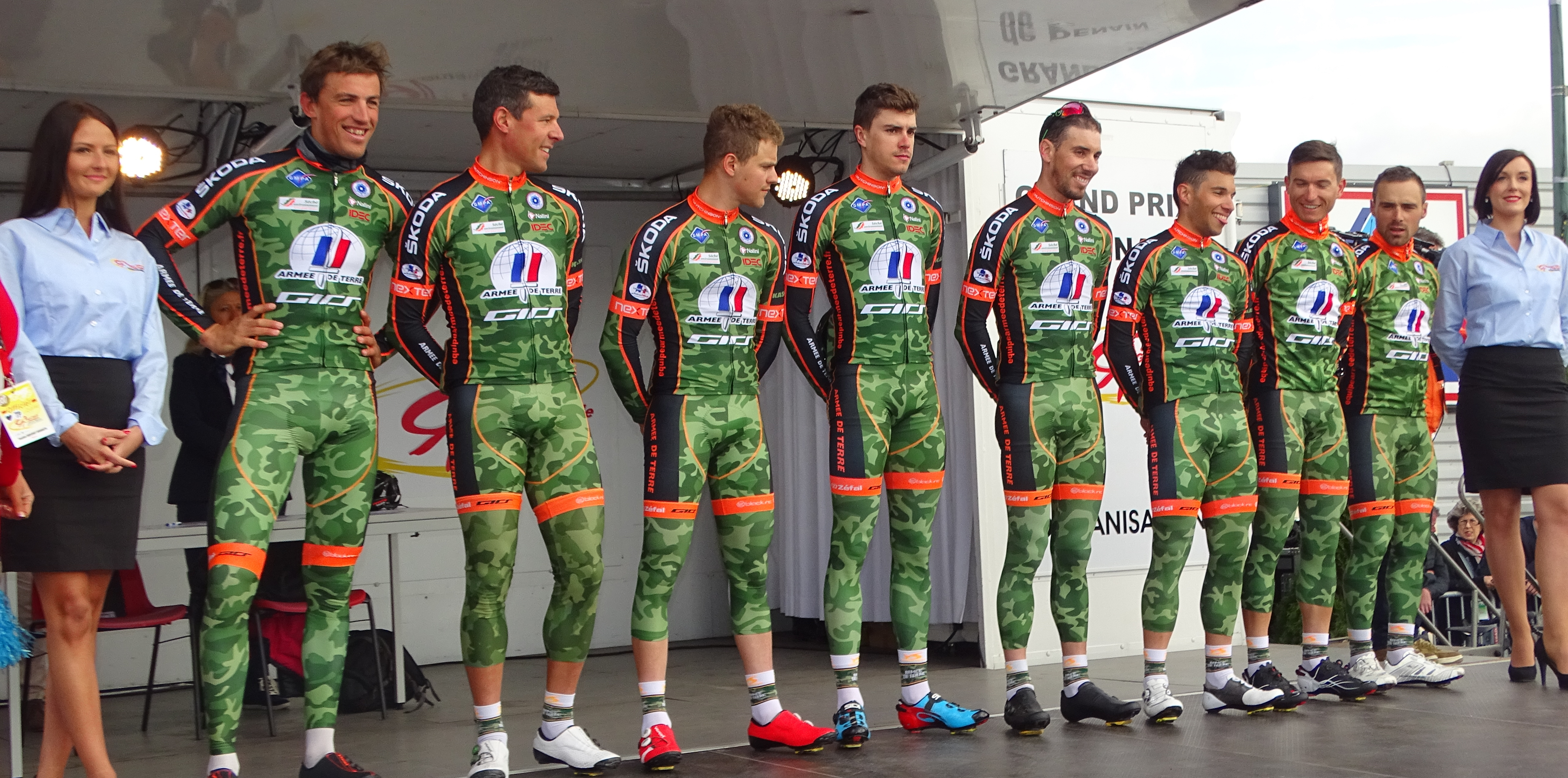 Reportage réalisé le jeudi 13 avril à l'occasion du départ et de l'arrivée du Grand Prix de Denain 2017 à Denain, Nord, Nord-Pas-de-Calais-Picardie, France.